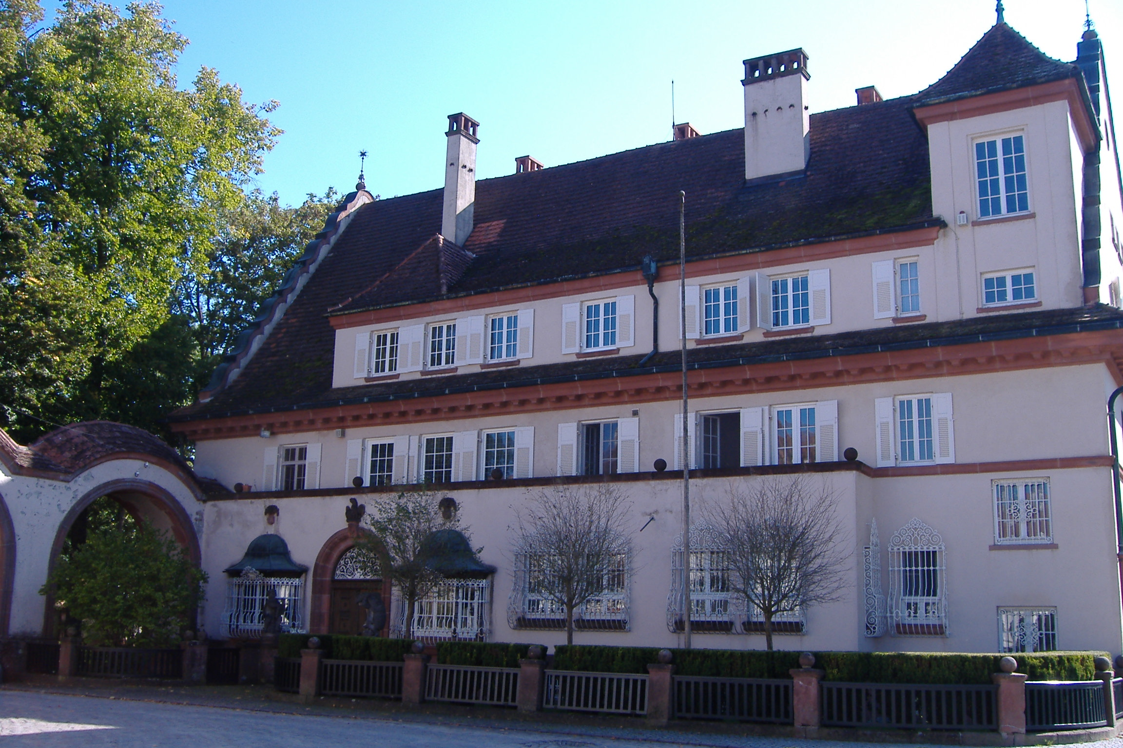 Gut Schwaighof